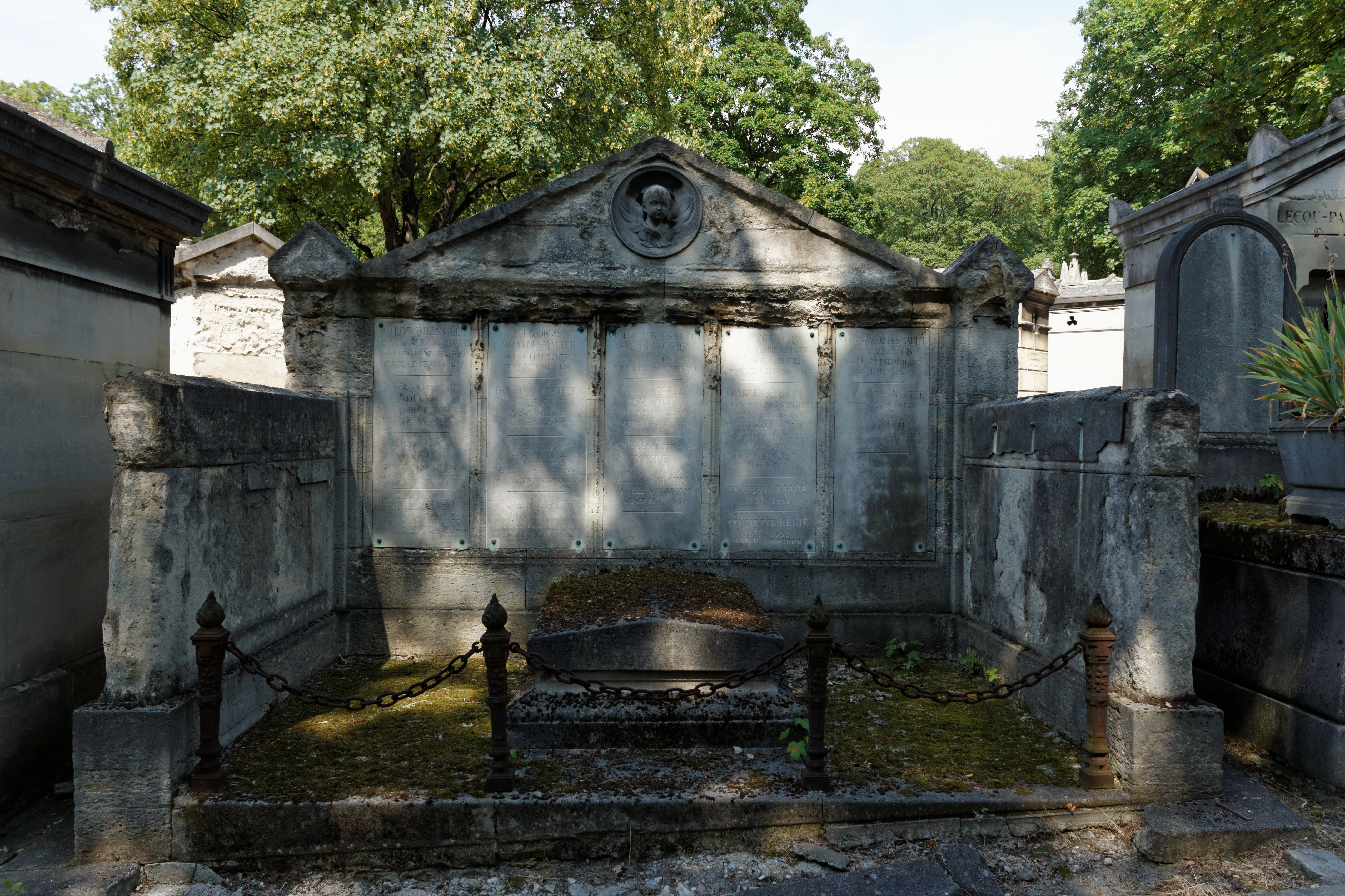 Vue d'ensemble